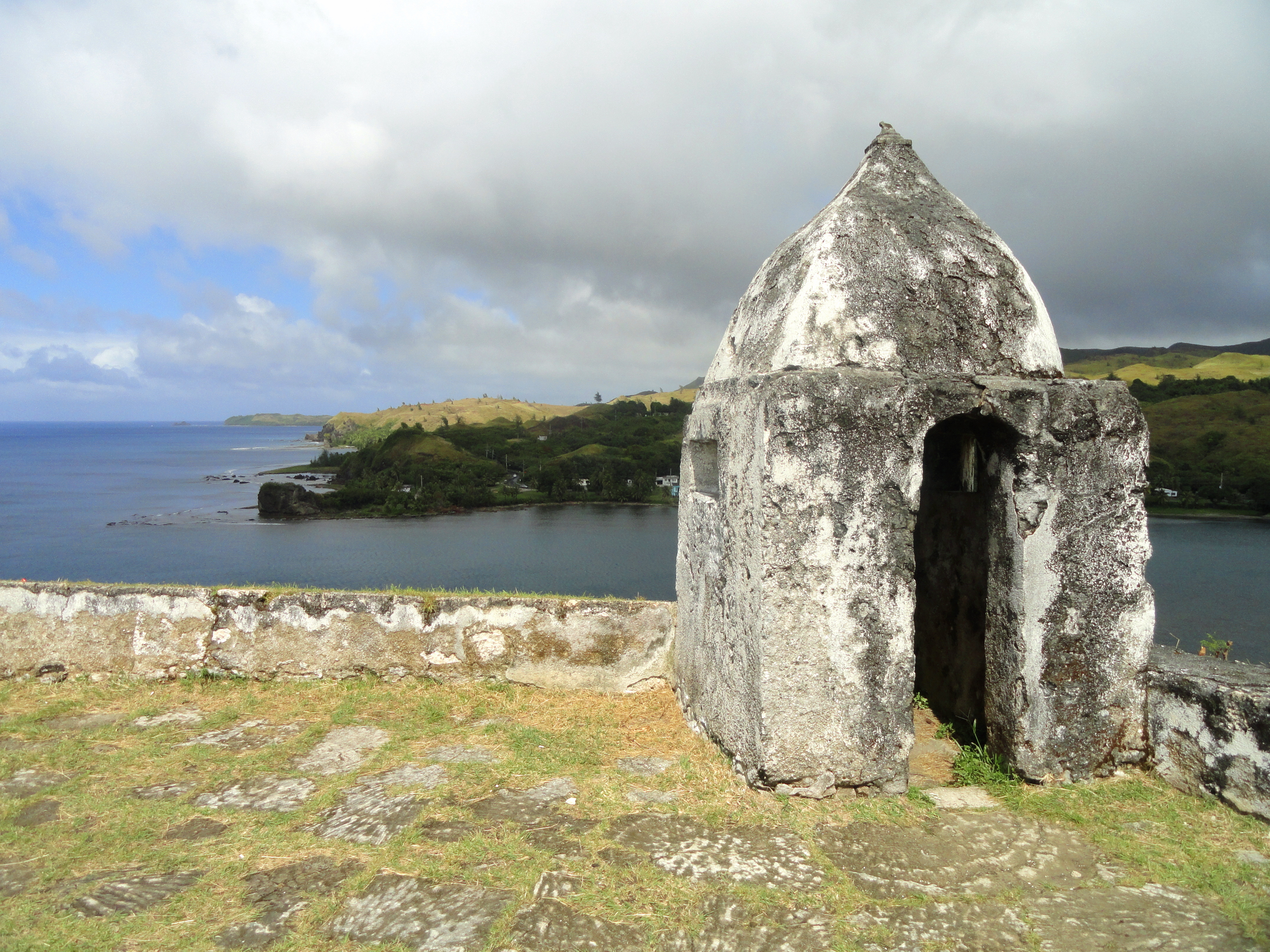 Fort Nuestra Señora de la Soledåd, Umatac, Guam, USA.